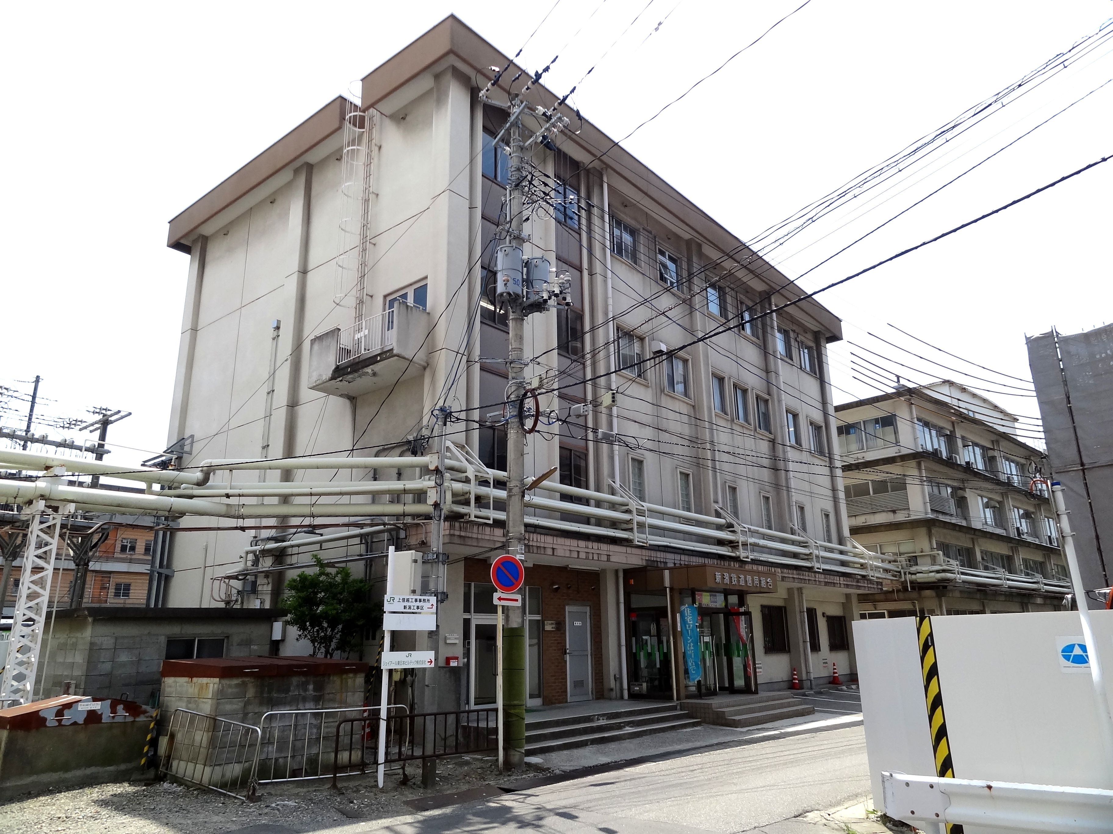 新潟鉄道信用組合本店